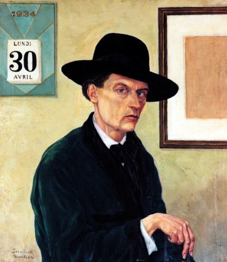 Автопортрет